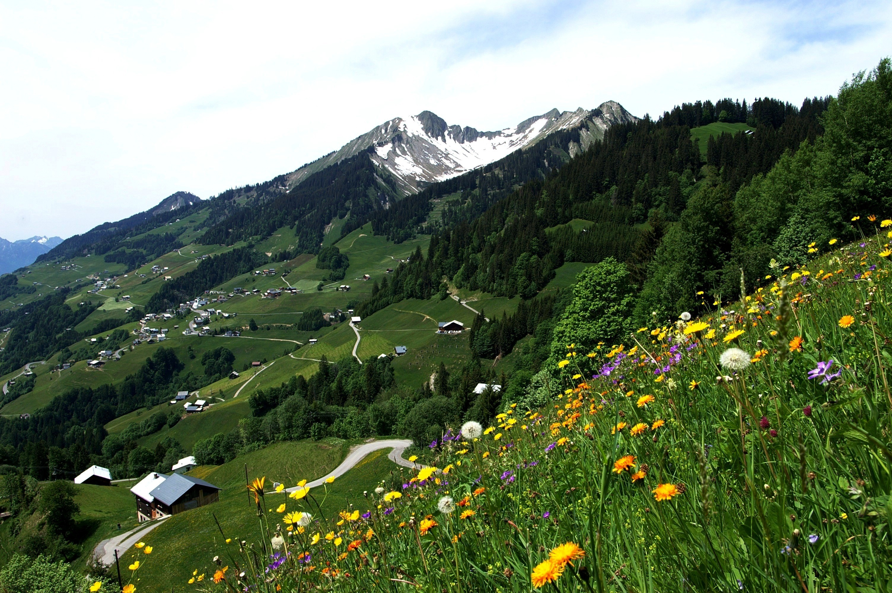 Blick vom Fusse der Blasenka auf Fontanella und das Türtschhorn.